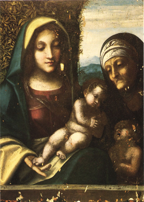 Correggio, Madonna col Bambino tra i santi Elisabetta e Giovanni Battista